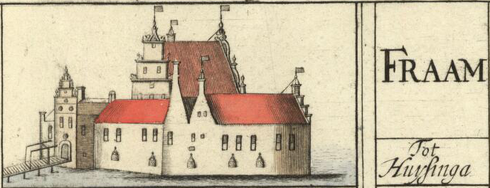 Fraam